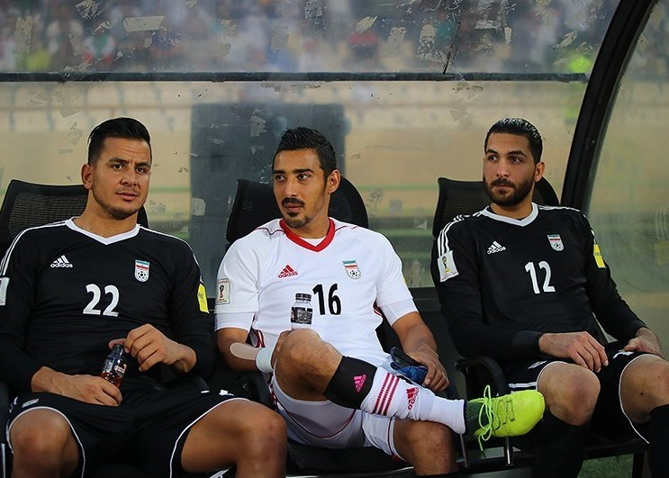 بازیکنان ایران در دیدار دیدار تیم‌های فوتبال ایران و سوریه در ورزشگاه آزادی - انتخابی جام جهانی فوتبال ۲۰۱۸